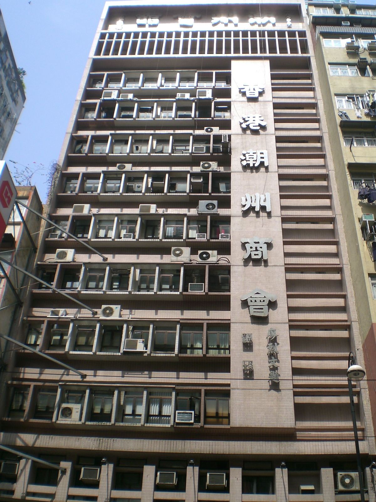 香港潮州商會, 德輔道西 - 廖烈文名字